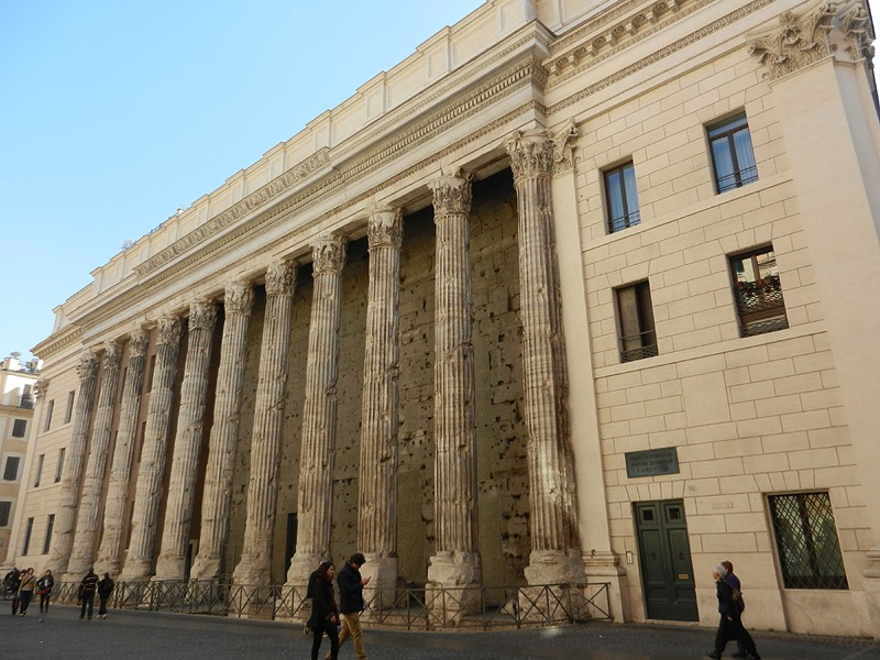 Roma - Borsa (Tempio di Adriano)